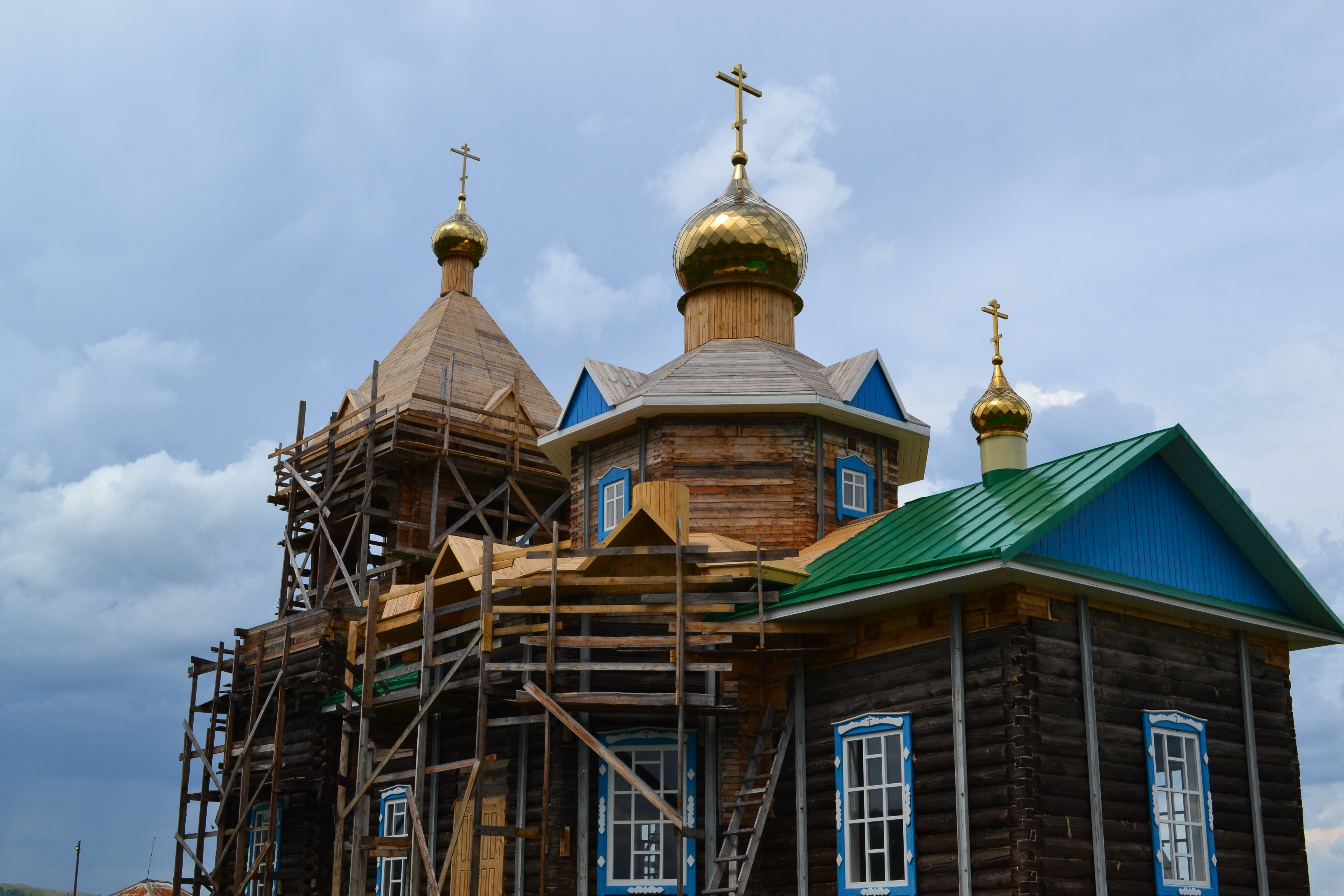 Идёт реставрация (2016)